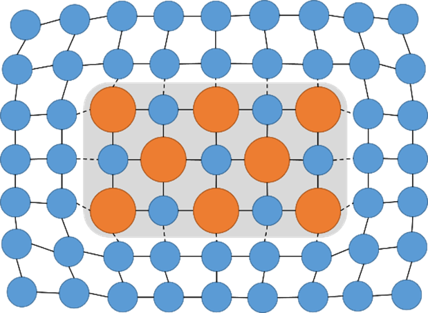 Erkauma vääristää kidehilaa, mikä vaikeuttaa dislokaatioiden liikettä.